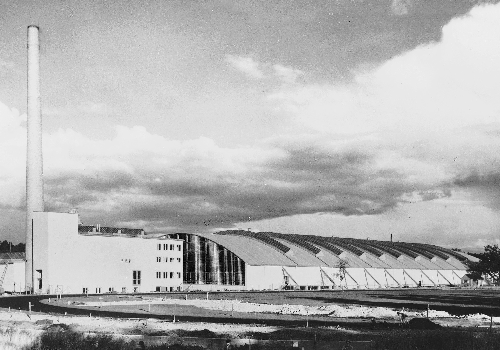 Hornsbergs bussgarage med tillhörande verkstadsbyggnad samt värmecentral.